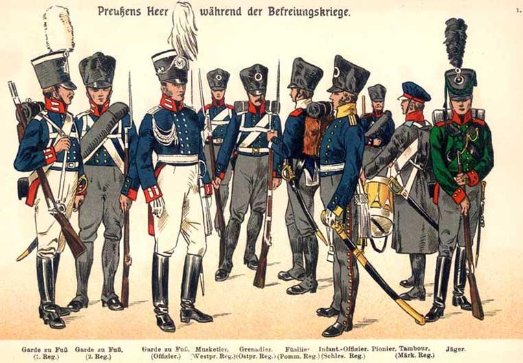 Preußisches Heer 1813